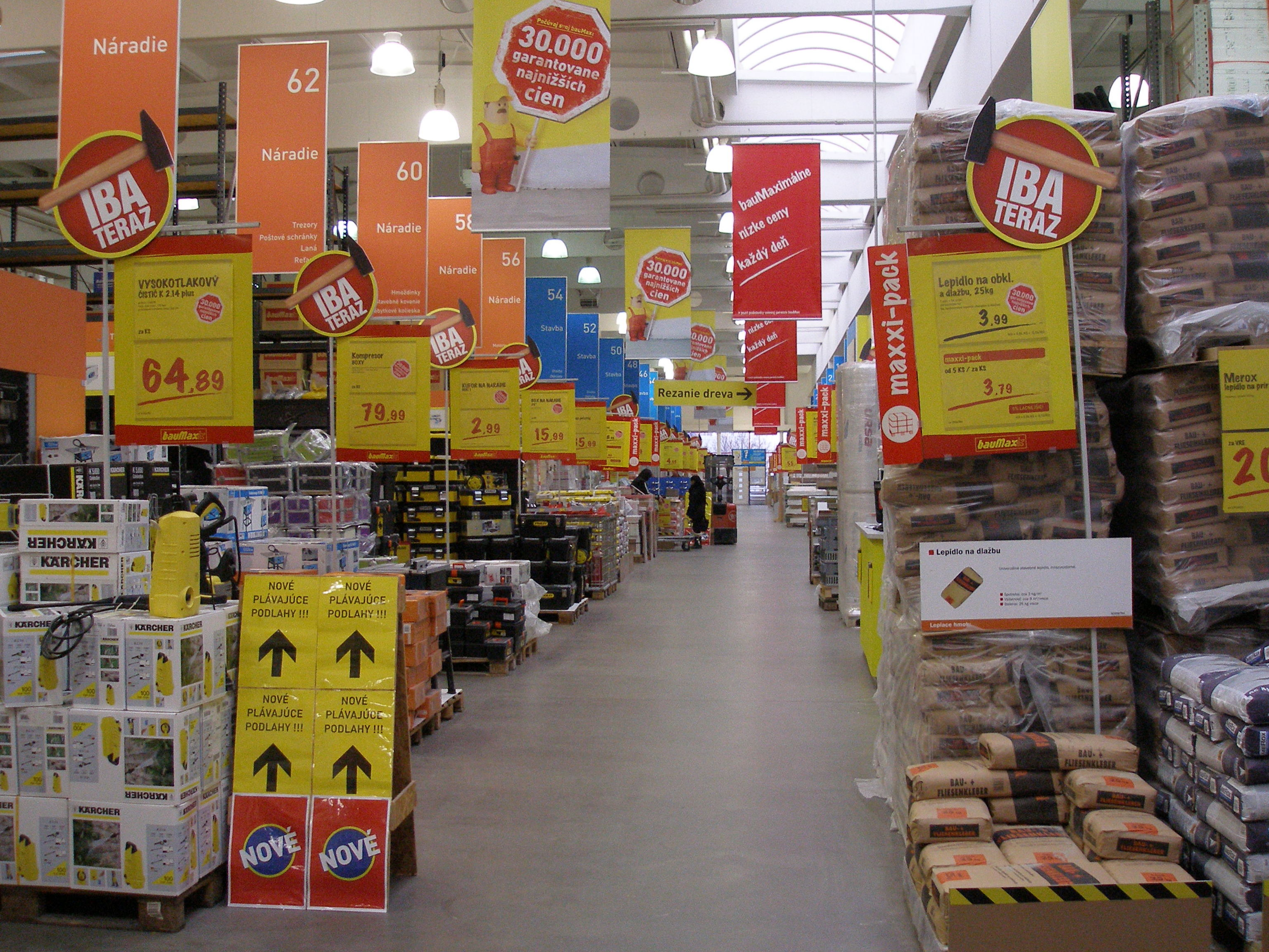 Interiér obchodného domu Baumax v Prešove na Košickej ulici.